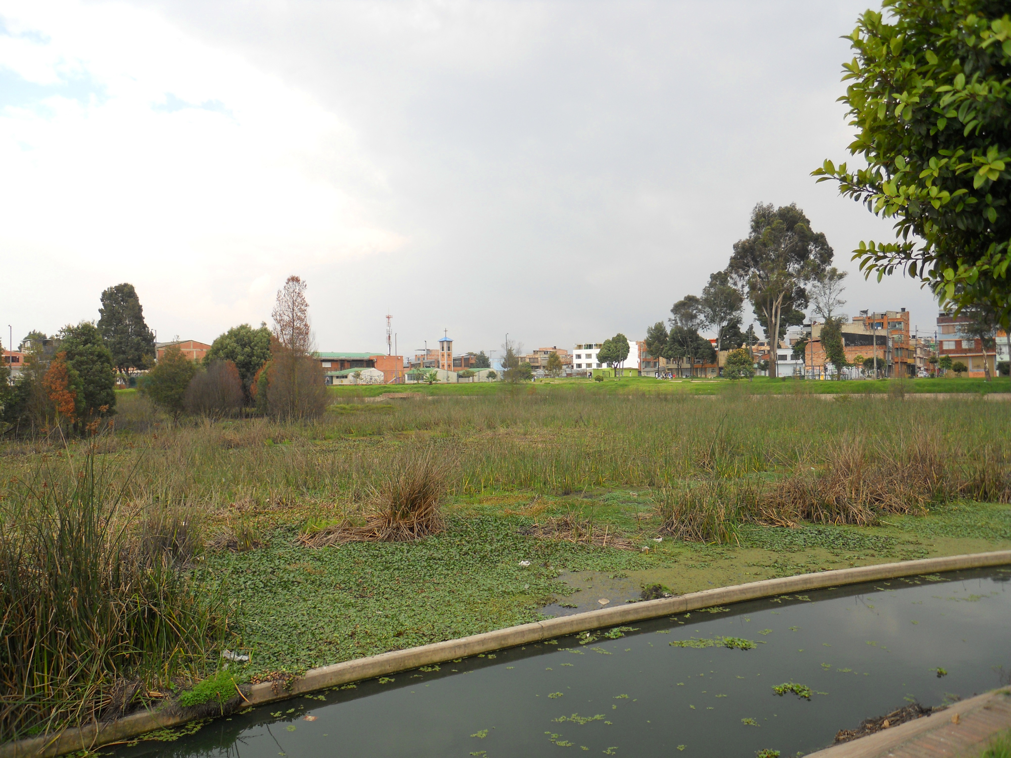 Humedal de El Jaboque, barrio Villa Amalia en la localidad de Engativá, hacia la carrera 111 a con calle 71, al occidente de Bogotá.